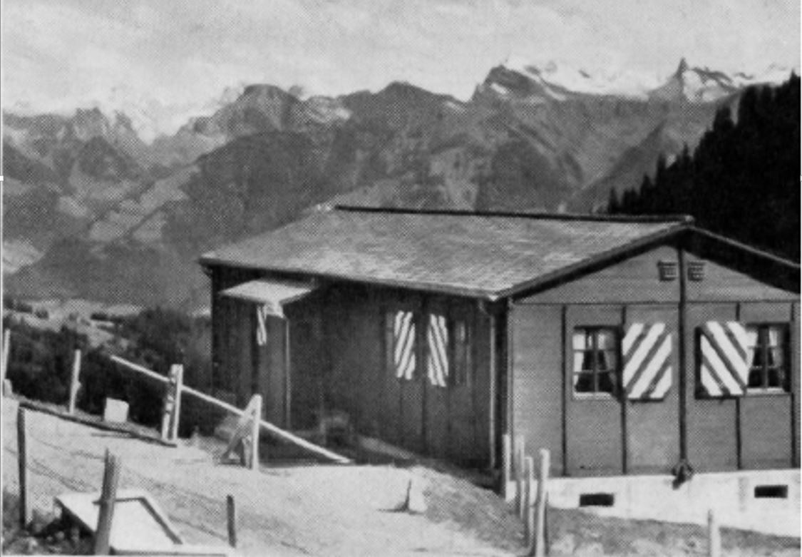 Soldatenstube Glaubenberg OW, Schweiz